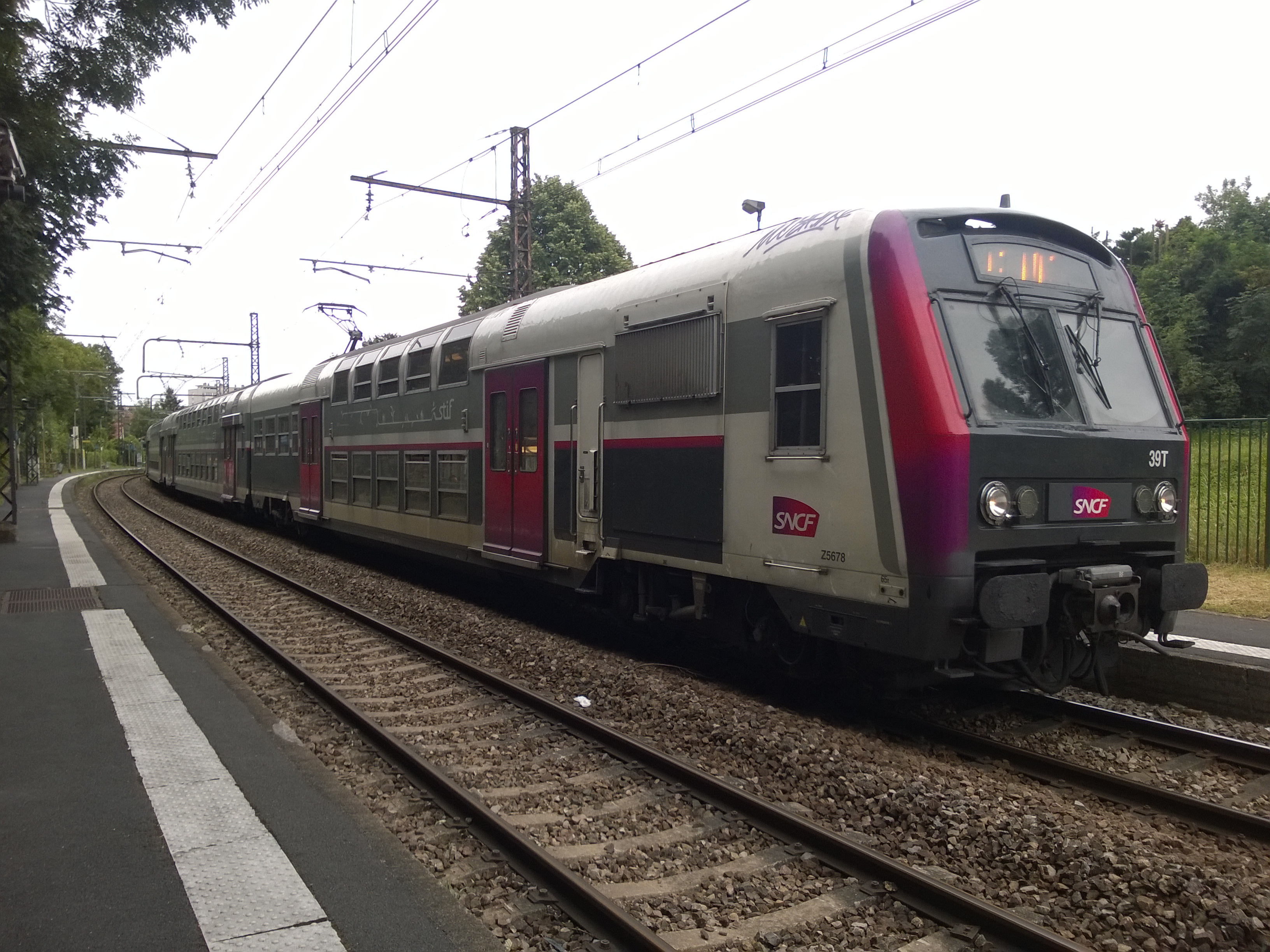 Gare du Petit Vaux, Épinay-sur-Orge (département de l'Essonne, France). Z 5600 Evolys pour Versailles-Chantiers via Massy.